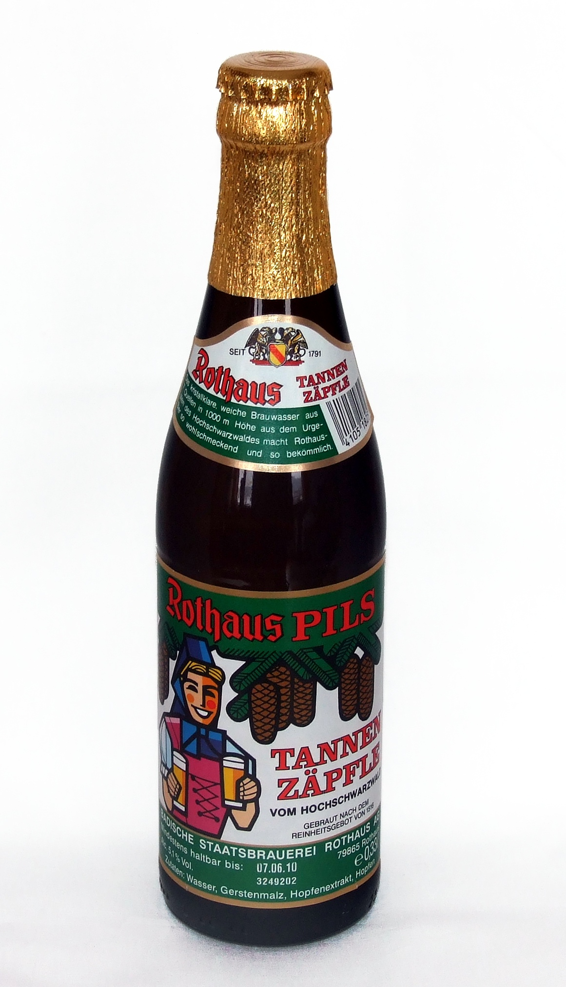 Eine Flasche Tannenzäpfle der Badischen Staatsbrauerei Rothaus.